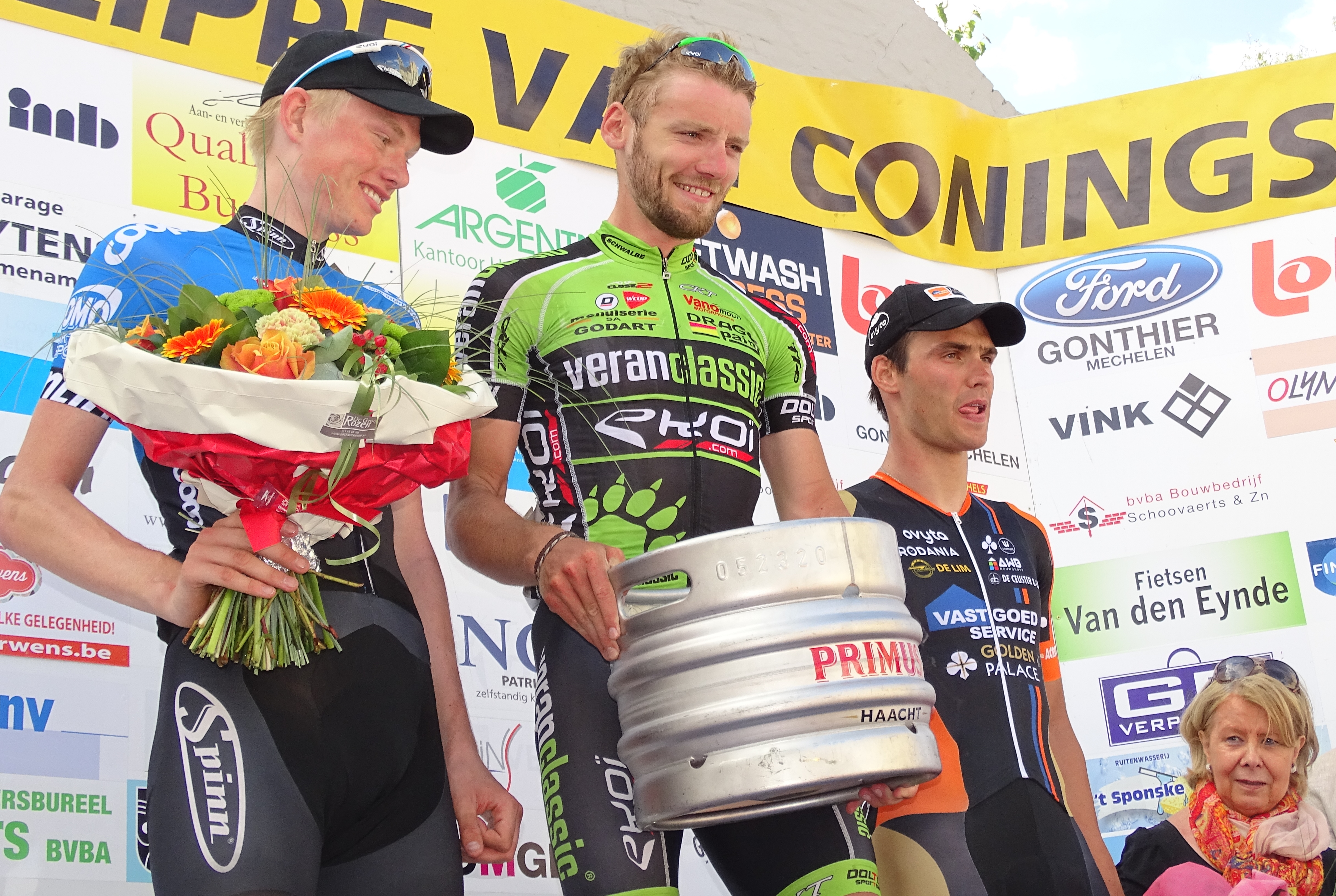 Reportage réalisé le dimanche 7 juin à l'occasion de l'arrivée du Mémorial Philippe Van Coningsloo 2015 à Bonheiden, Belgique.